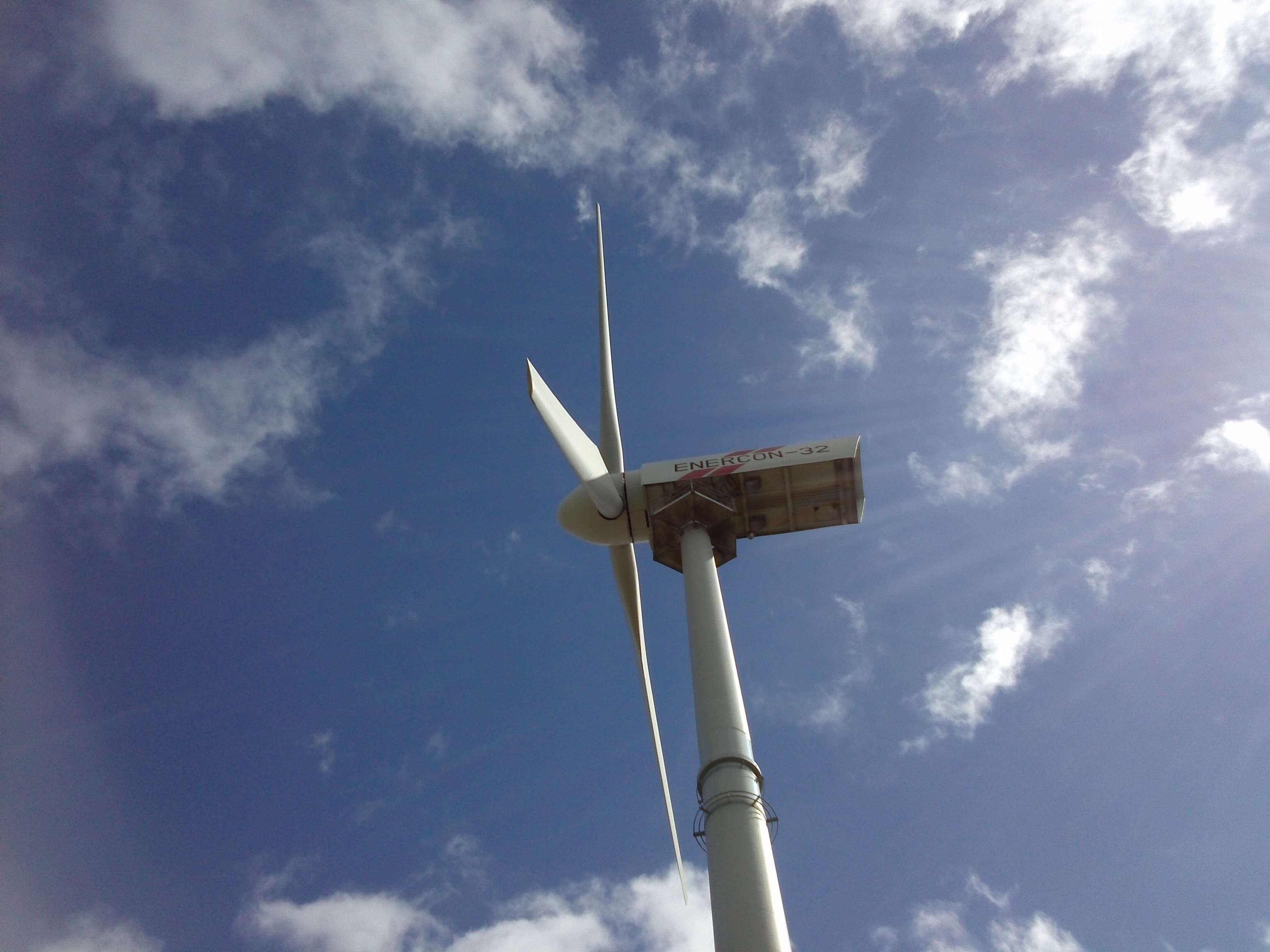 Windenergieanlage ENERCON - 32